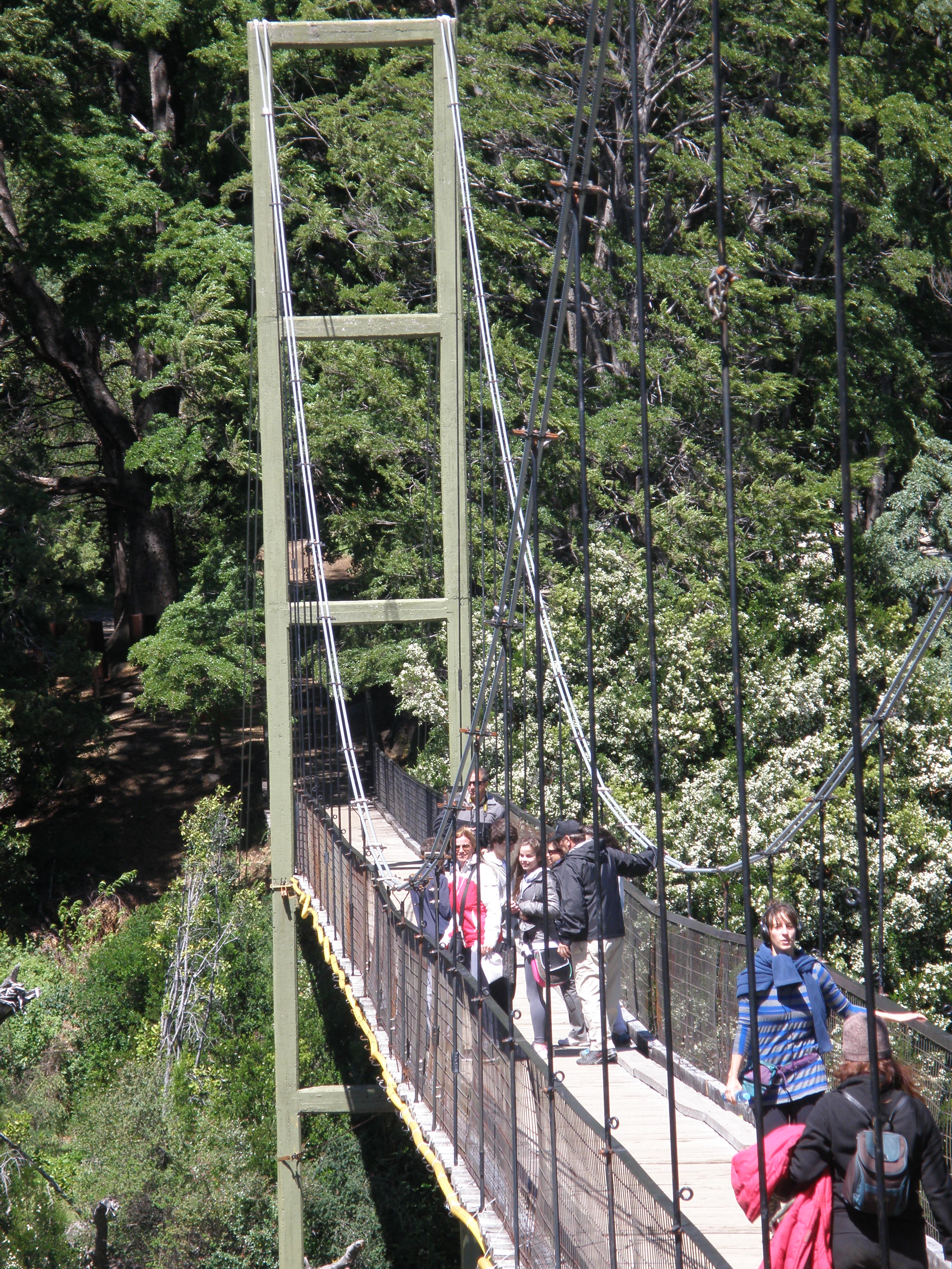 puente colgante llamado la pasarela